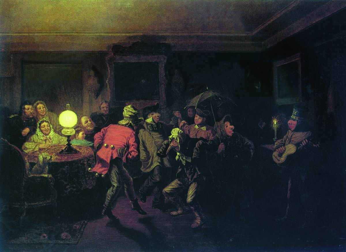 Л. И. Соломаткин. Ряженые. 1873. Холст, масло. Государственный Русский музей